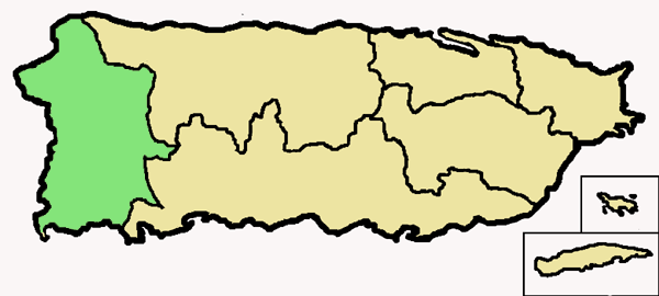 Mappa della diocesi cattolica di Mayagüez, a Puerto Rico. Anno 2009.